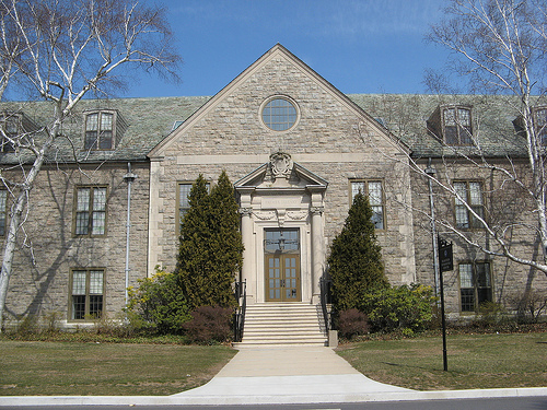 Blaustein Humanities Center